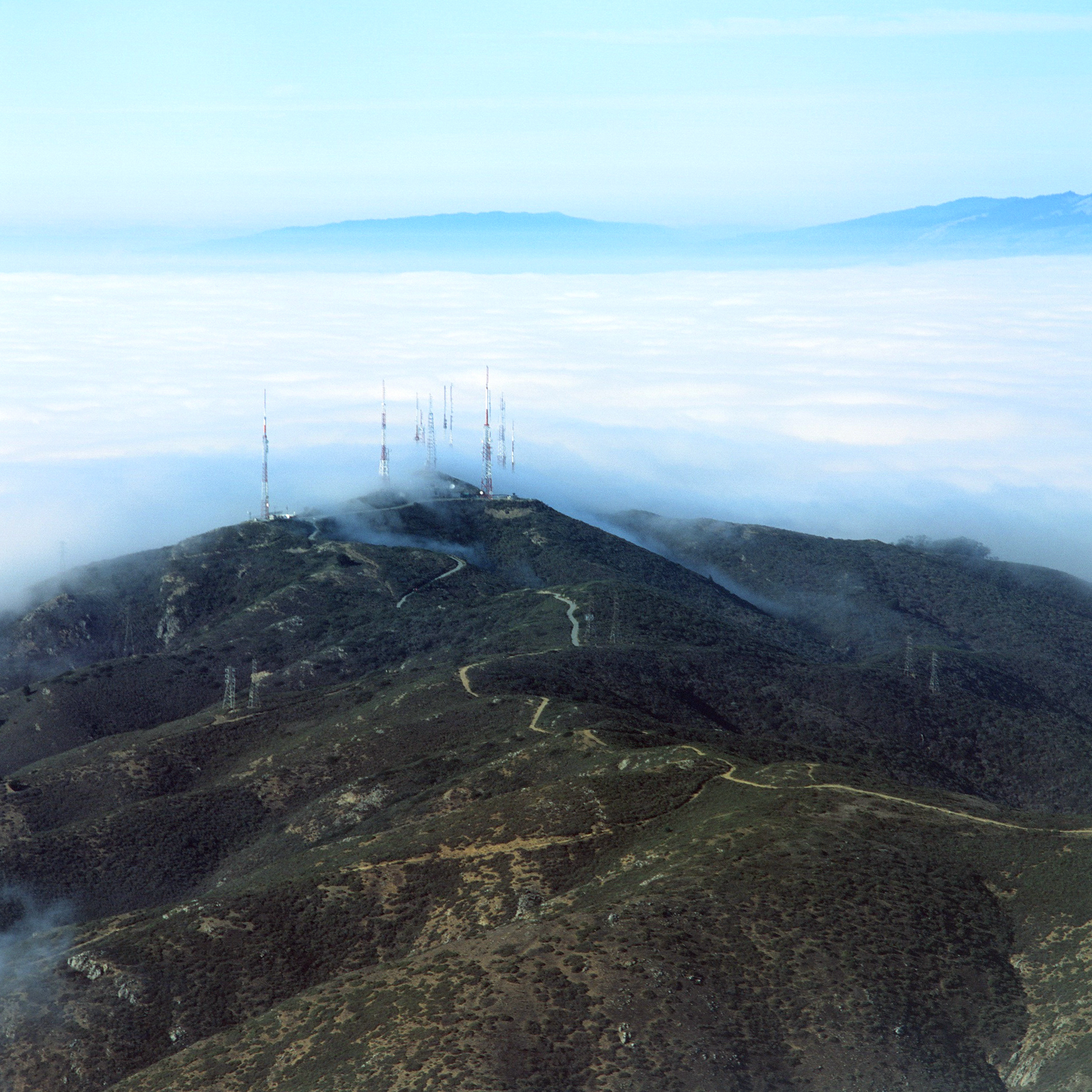 Mamiya C330 Fuji Provia 100 film